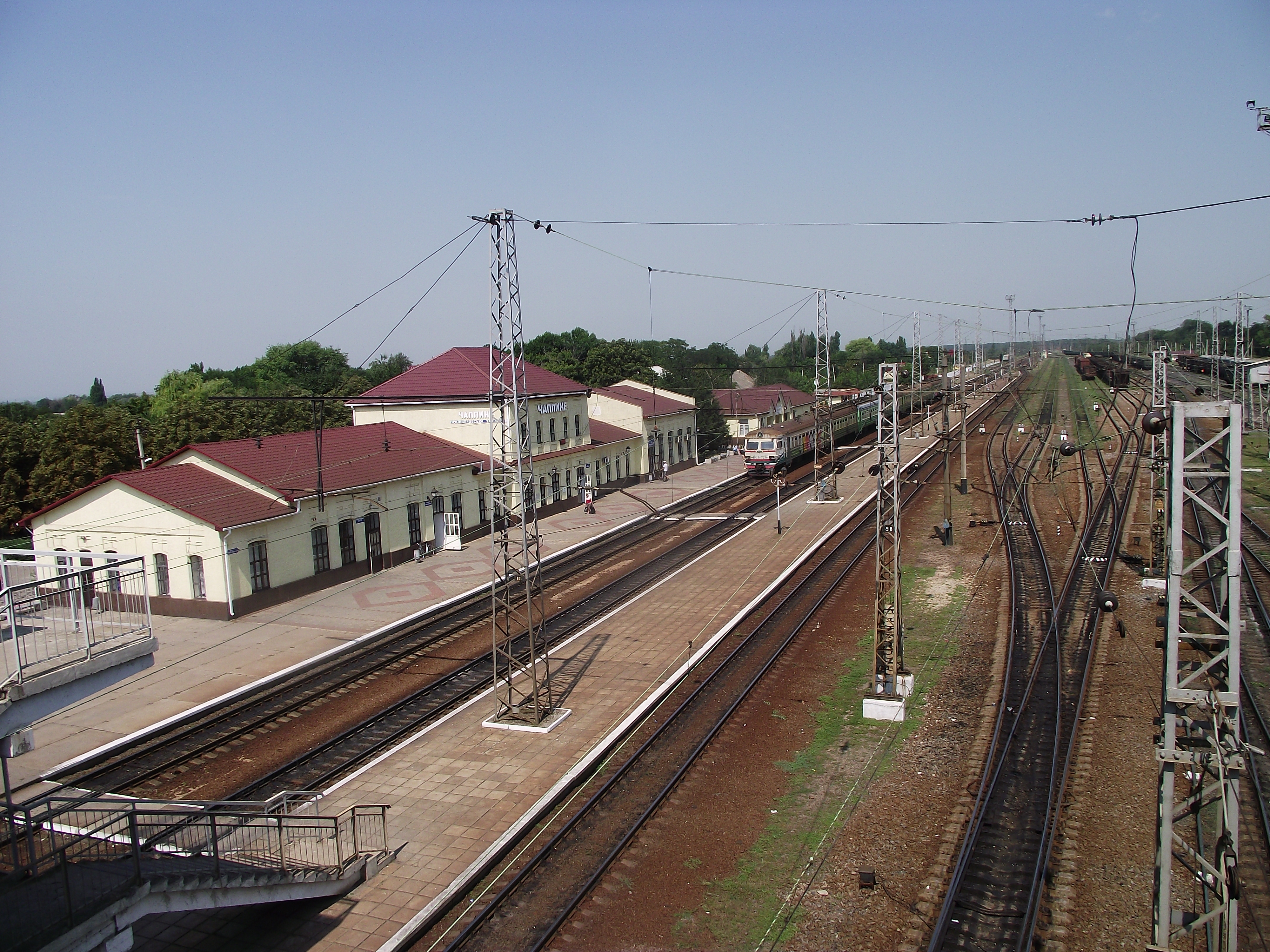 Здание вокзала